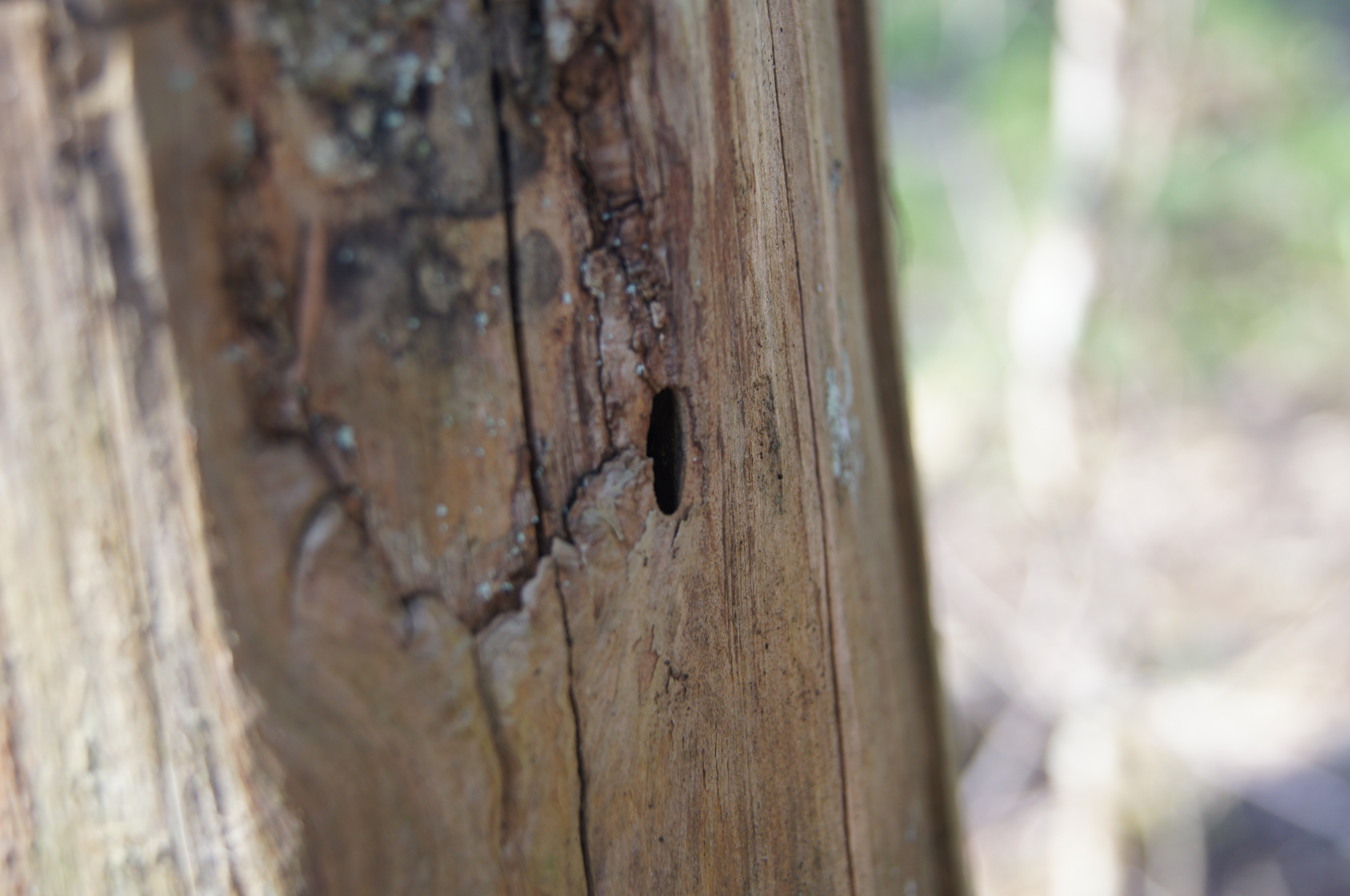 Didžiojo skydvabalio (Peltis grossa) anga.